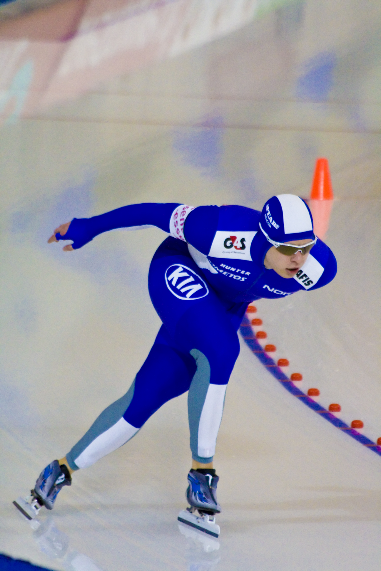 Pasi KOSKELA, Finland